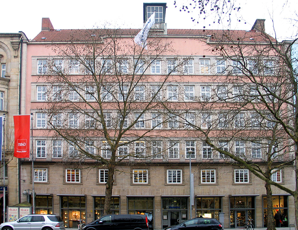 Im Winter lassen die entlaubten Bäume in der Georgstraße heute (Stand: 03/2013) seltene Ansichten zu: Elektronisch entzerrter Frontalblick auf das 1927 von Karl Siebrecht für Walter Jänecke, den Verleger des Hannoverschen Kuriers, auf das Kurierhaus ...